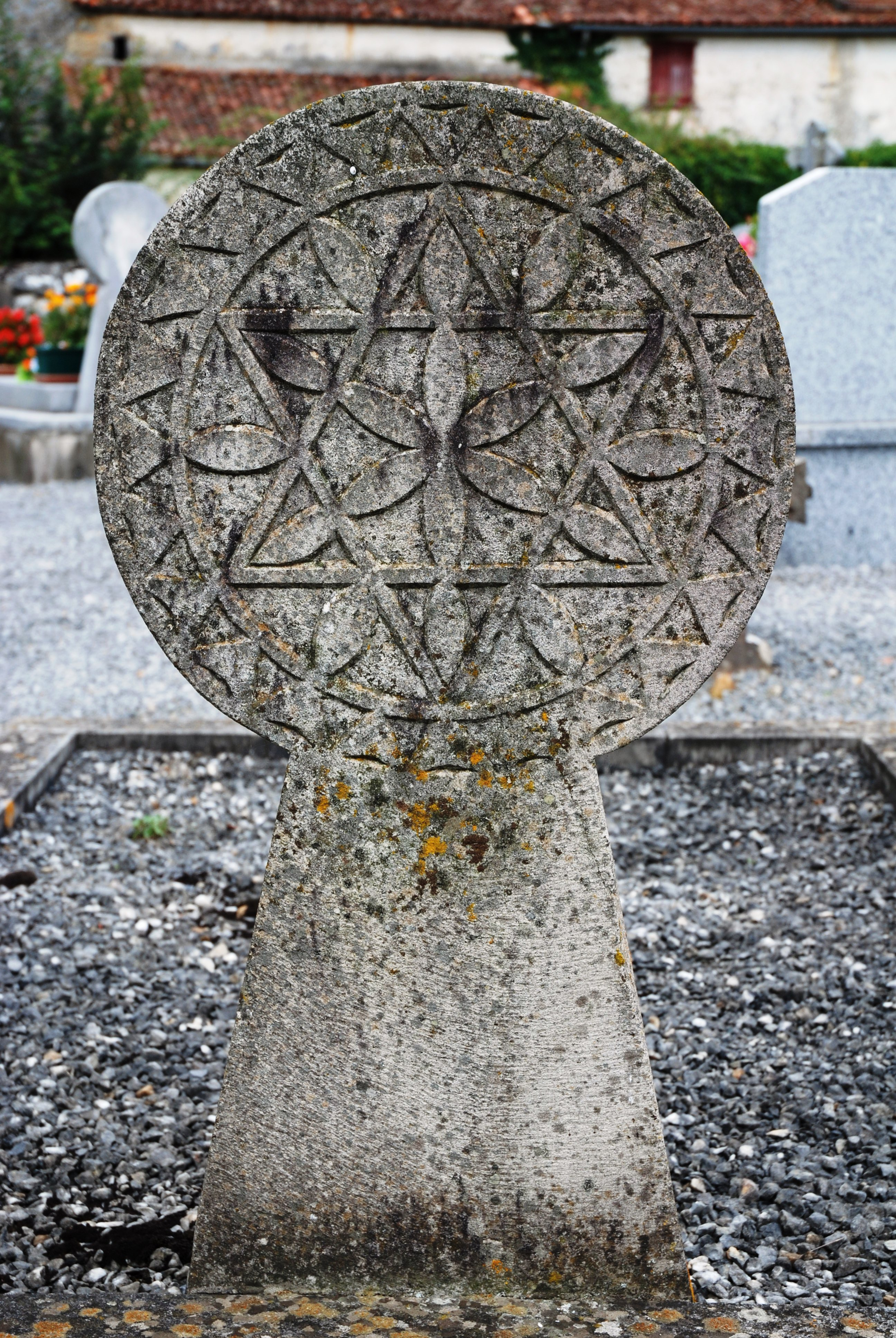 Stèle discoïdale dans le cimetière d'Ainhice-Mongelos